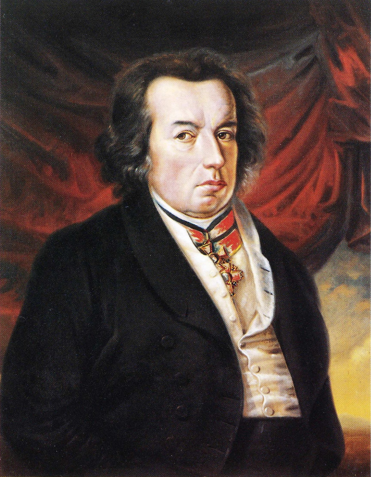 Turun Akatemian kaunopuheisuuden ja runousopin professori Johan Fredrik Wallenius (1765–1836). Gustaf Wilhelm Finnbergin maalaama muotokuva vaurioitui vuoden 1827 Turun palossa, joten sitä on myöhemmin korjailtu ja tausta ilmeisesti maalattu kokonaan uusiksi. Muotokuva kuuluu Helsingin yliopiston kokoelmiin.